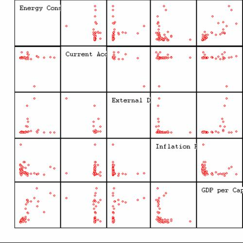 scatterplot ms